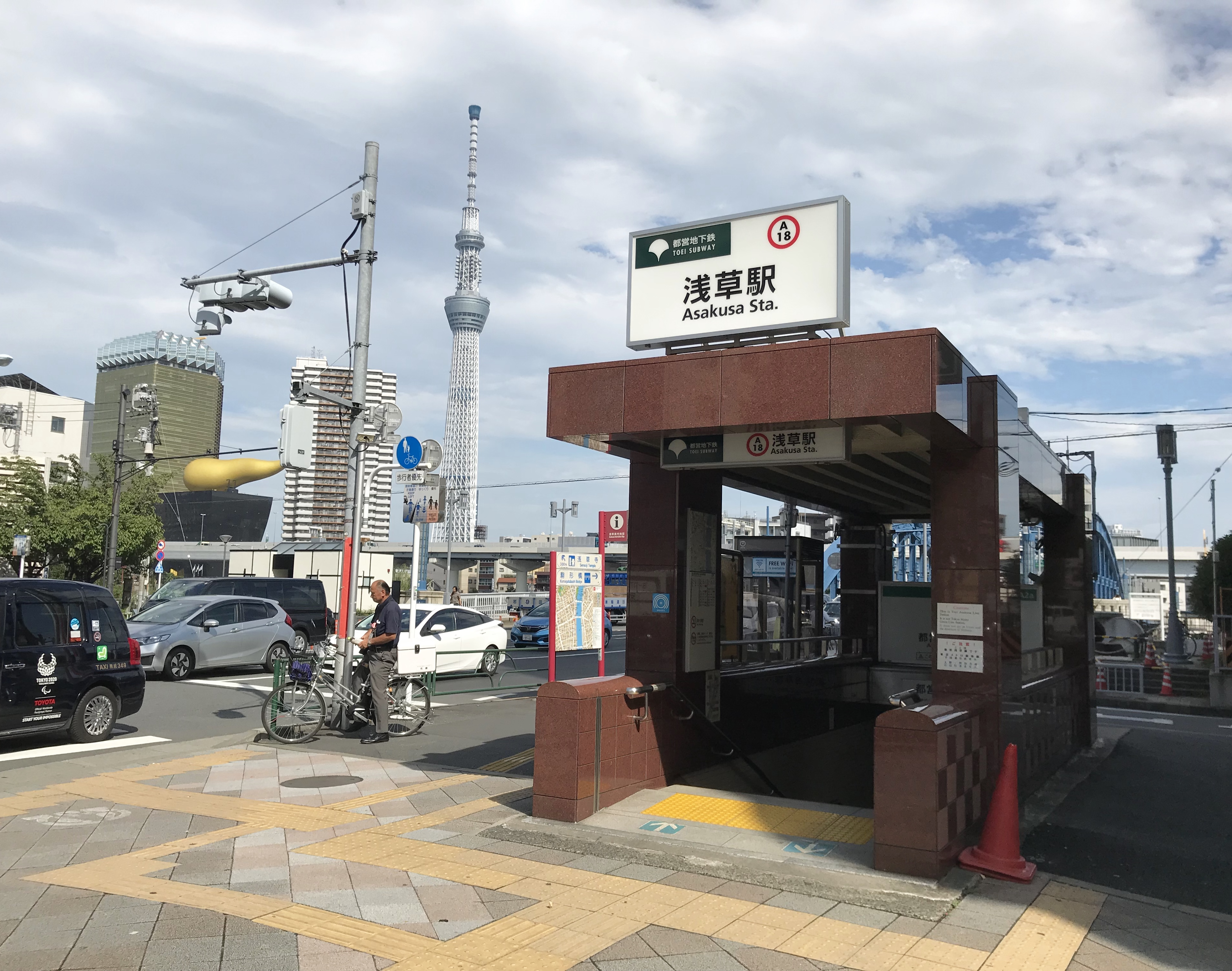 都営地下鉄浅草線浅草駅A2a番出入口